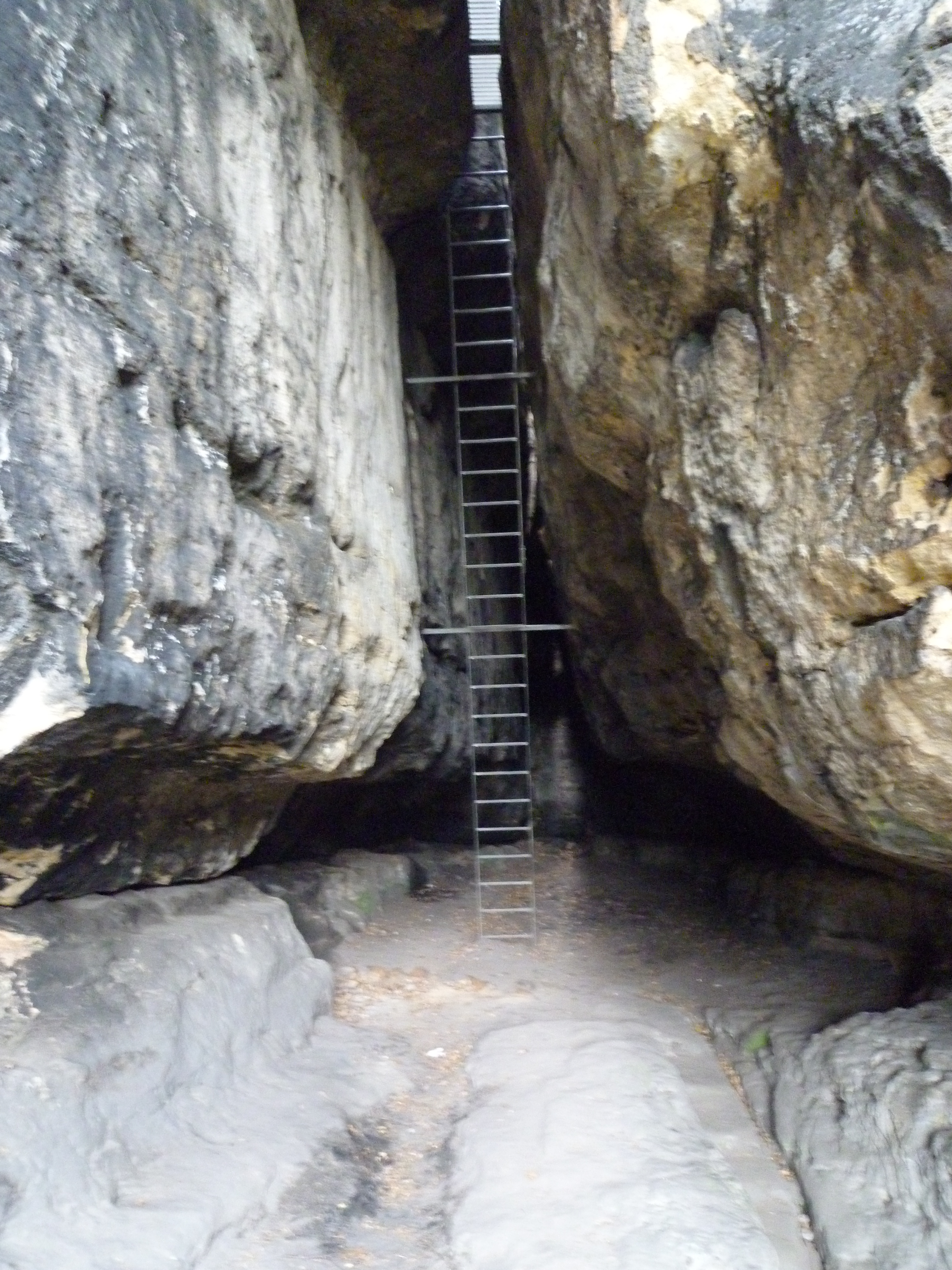 Blick in die Klufthöhle des Wintersteins mit Aufstiegsleiter auf das Burgplateau